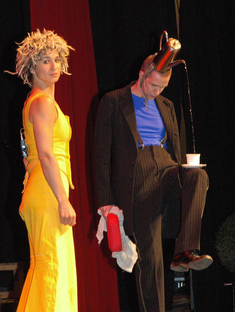 Auftritt bei der Freiburger Kulturbörse am 2. Februar 2009